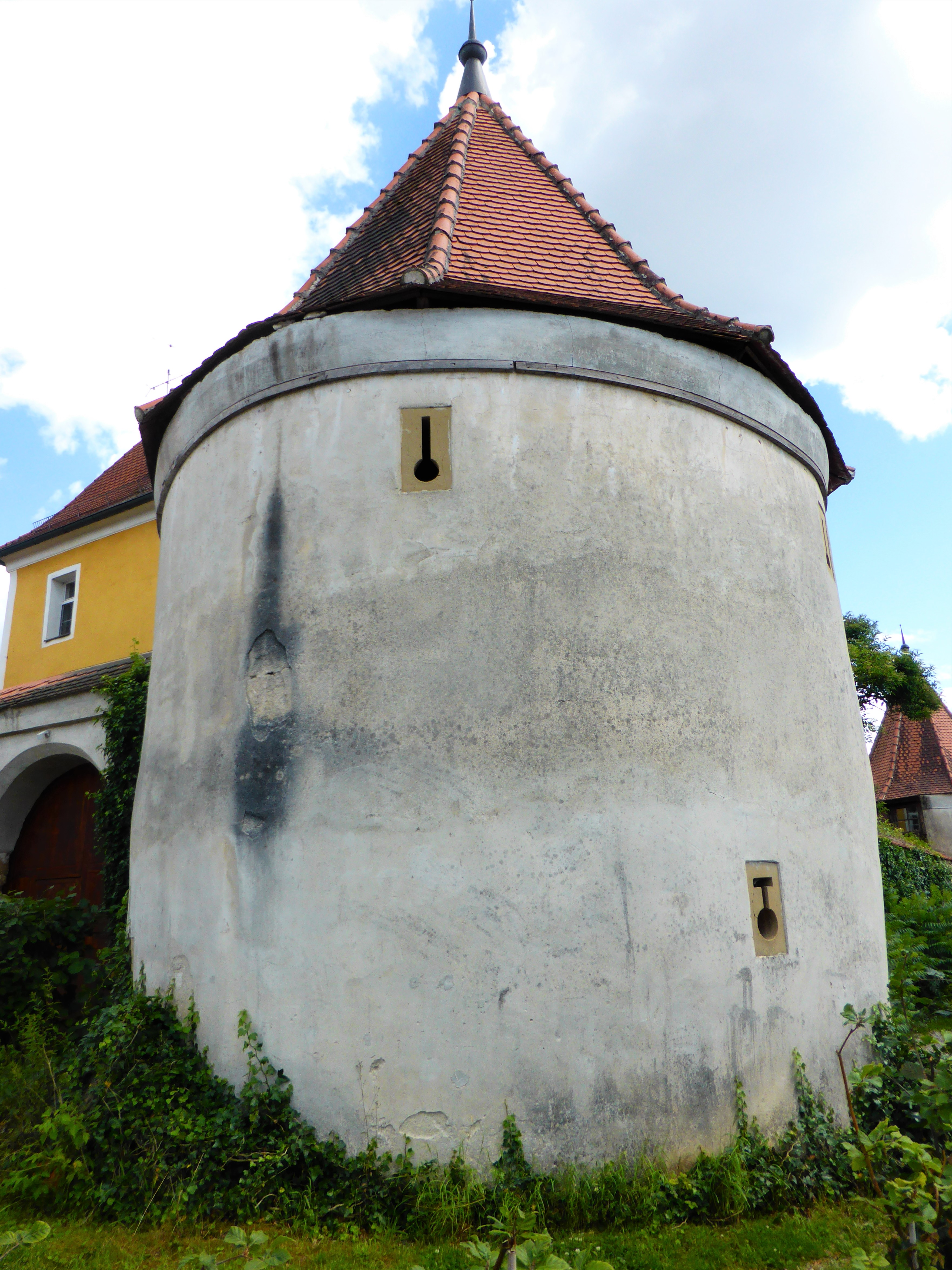 Schloss Moos (Kümmersbruck)